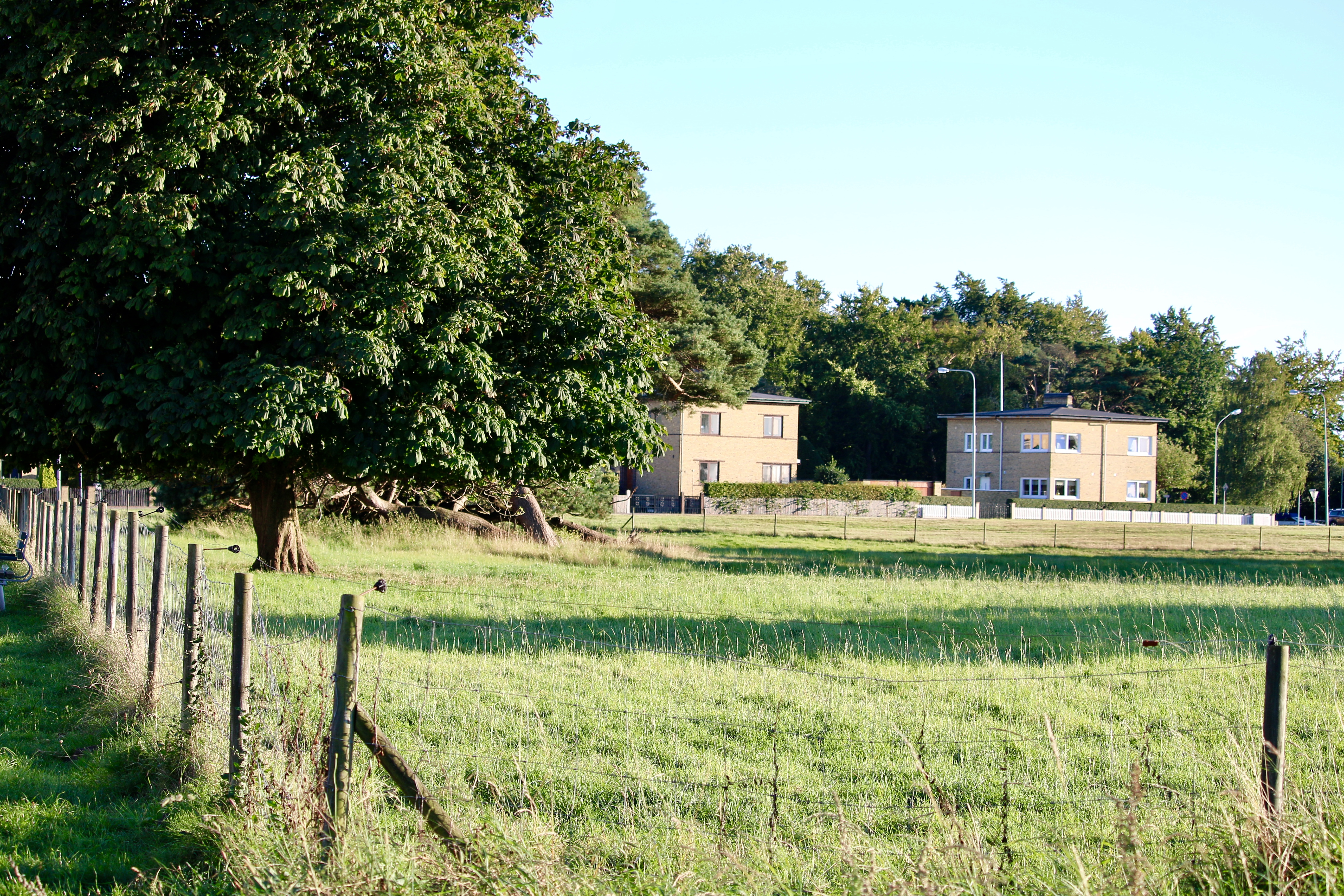 Exercisfältet i Landskrona